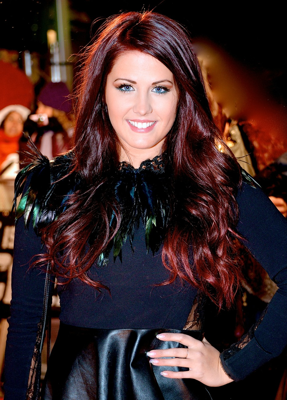 Molly Sandén på filmpremiären av Jack Reacher i Filmstaden i Stockholm den 11 december 2012.